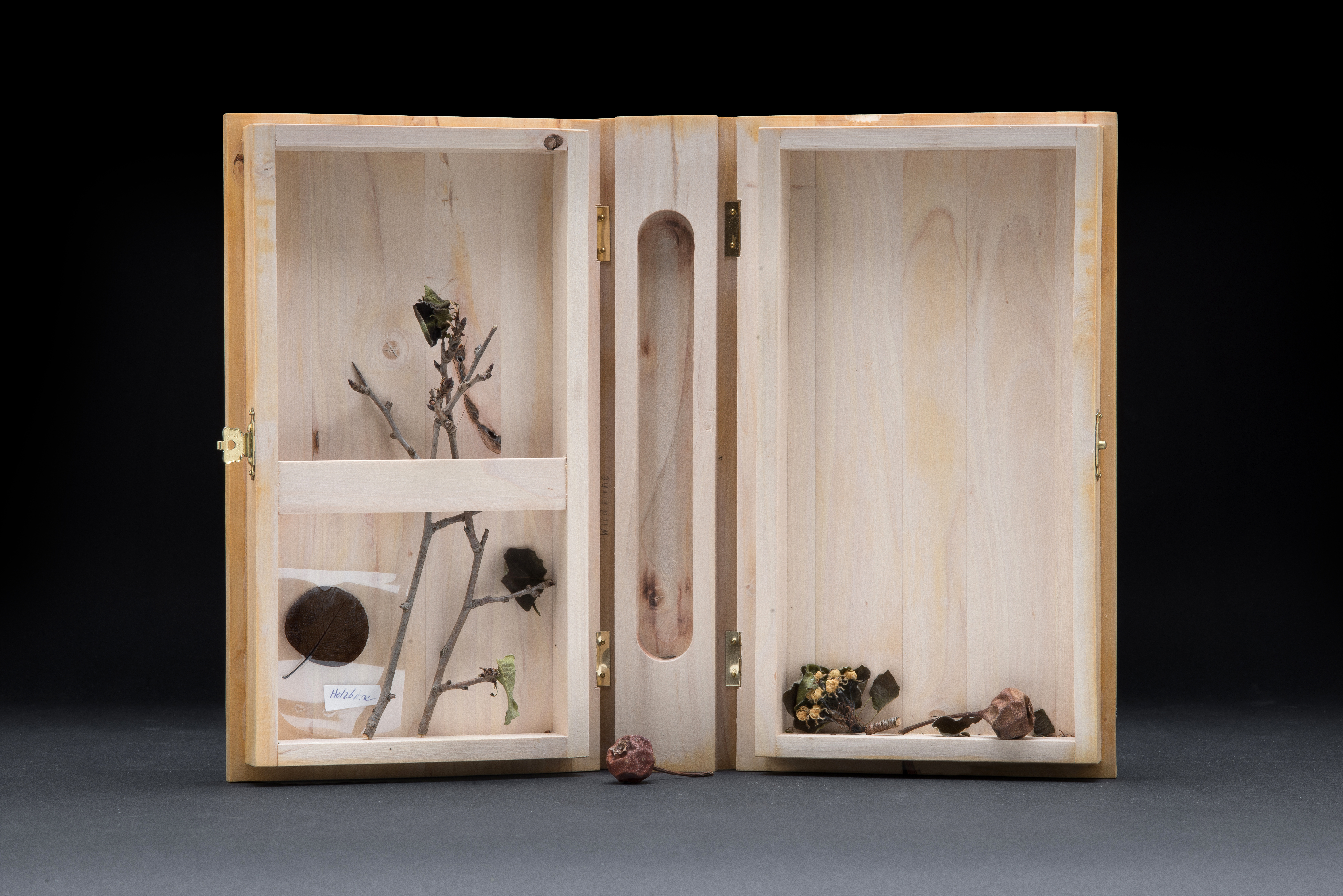 Xylothek